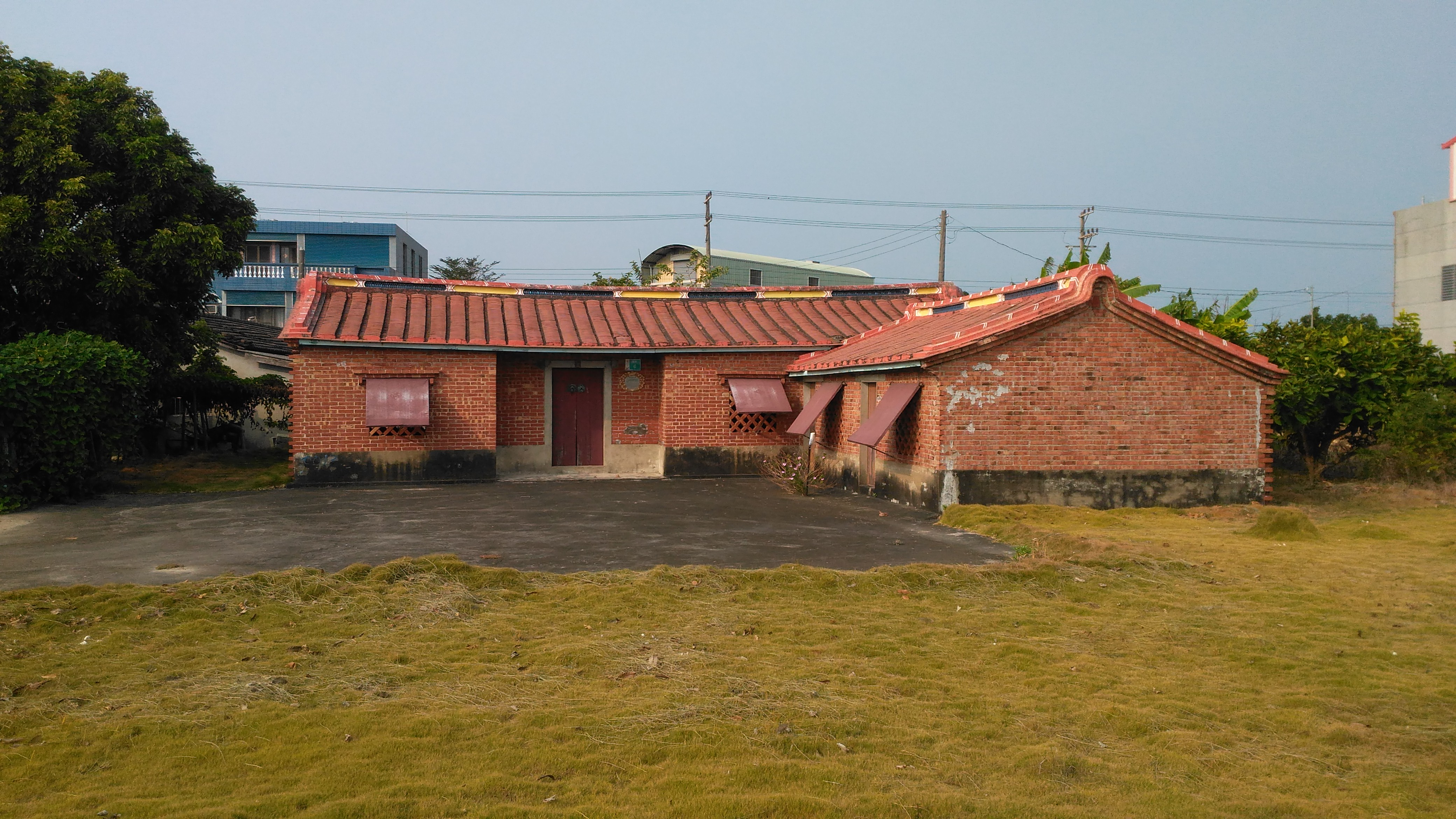 臺南幫名人侯雨利的故居